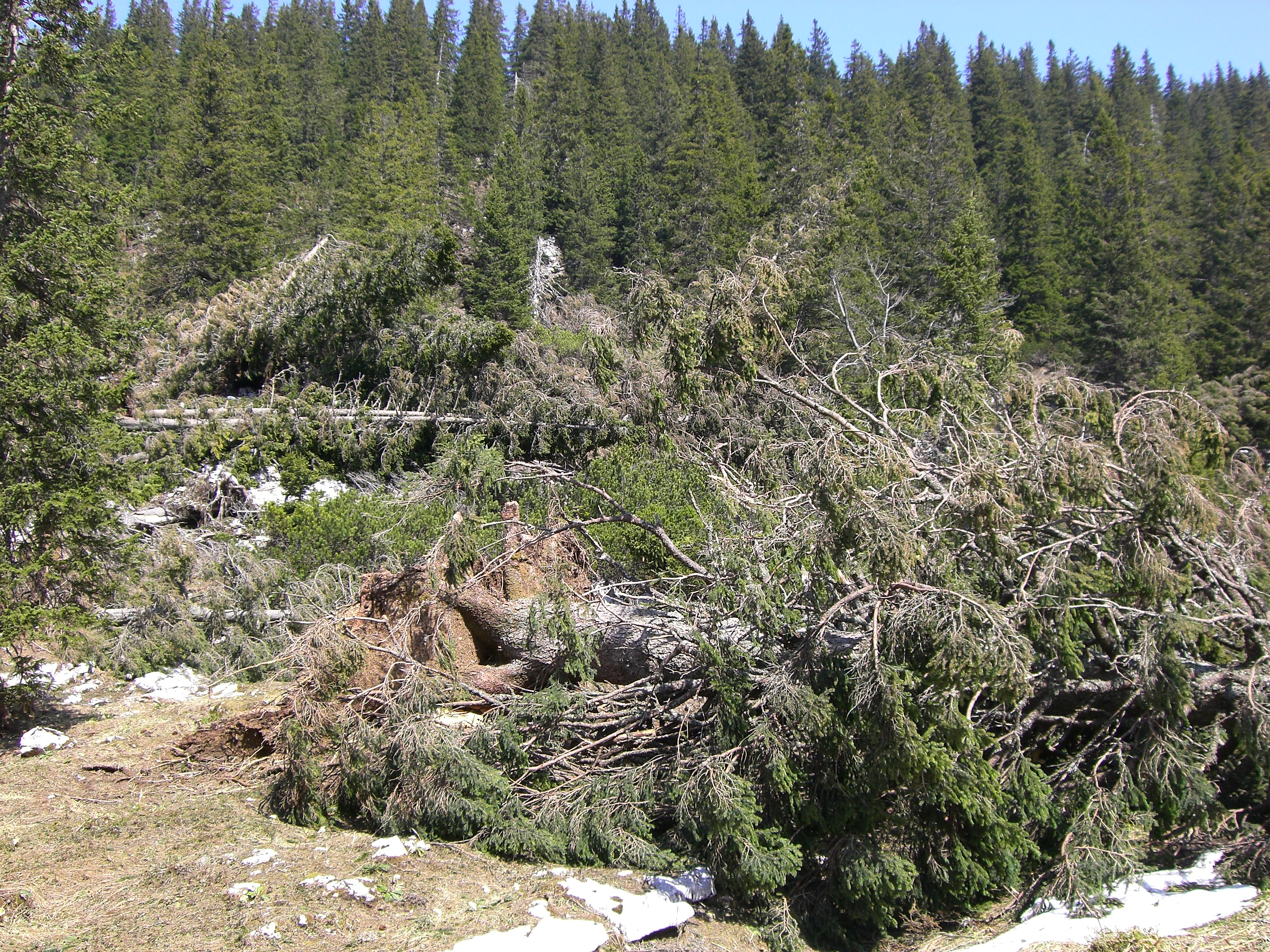 Windwurf Kyrill im Bleggagraben